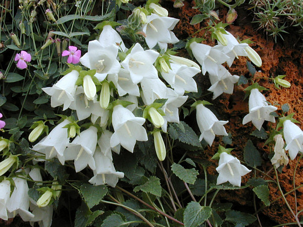 Campanule de 10 à 25 cm originaire de Turquie que l'on rencontre entre 250 et 2300 m. Elle pousse dans les crevasses calcaire ou volcanique.